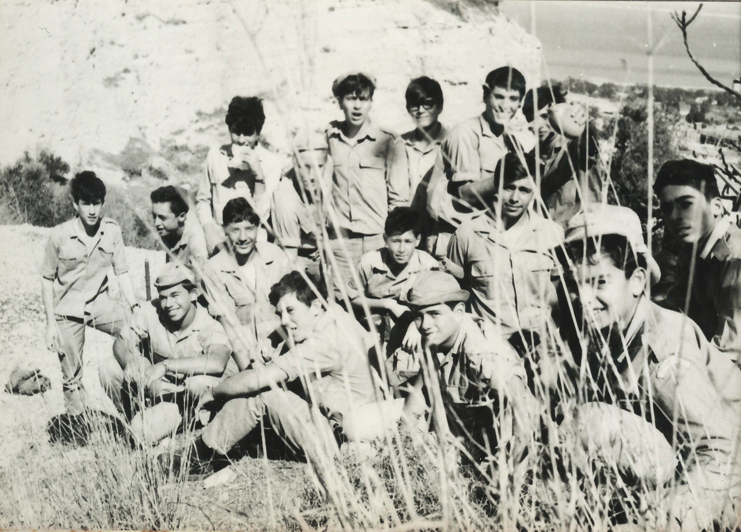 Bosmat Gadna Haifa, Class10, 1969